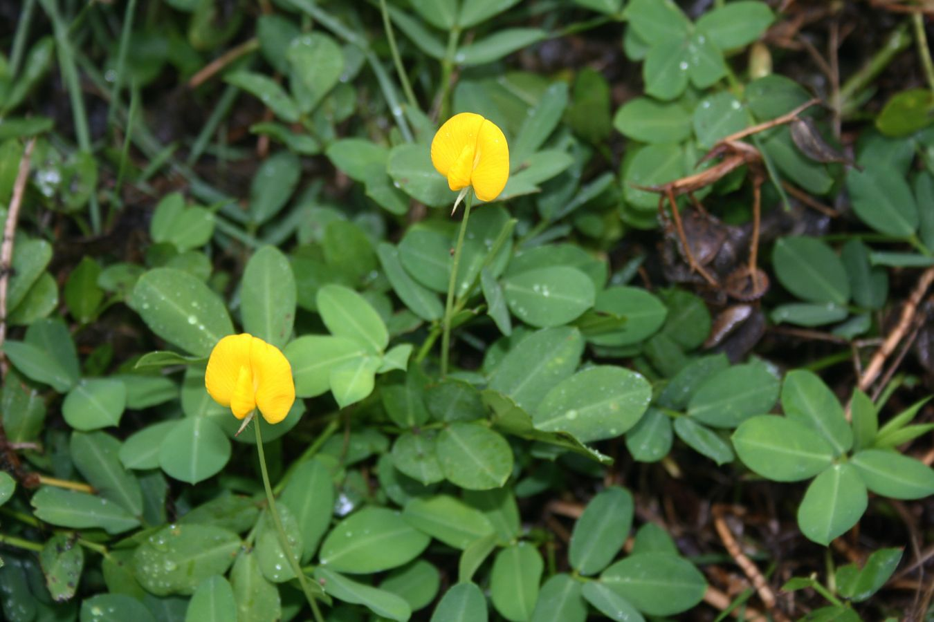 Arachis pintoi, Hülsenfrüchtler (Fabaceae), Faboideae - Costa Rica: Prov. Puntarenas, Hacienda Barú NW Dominical